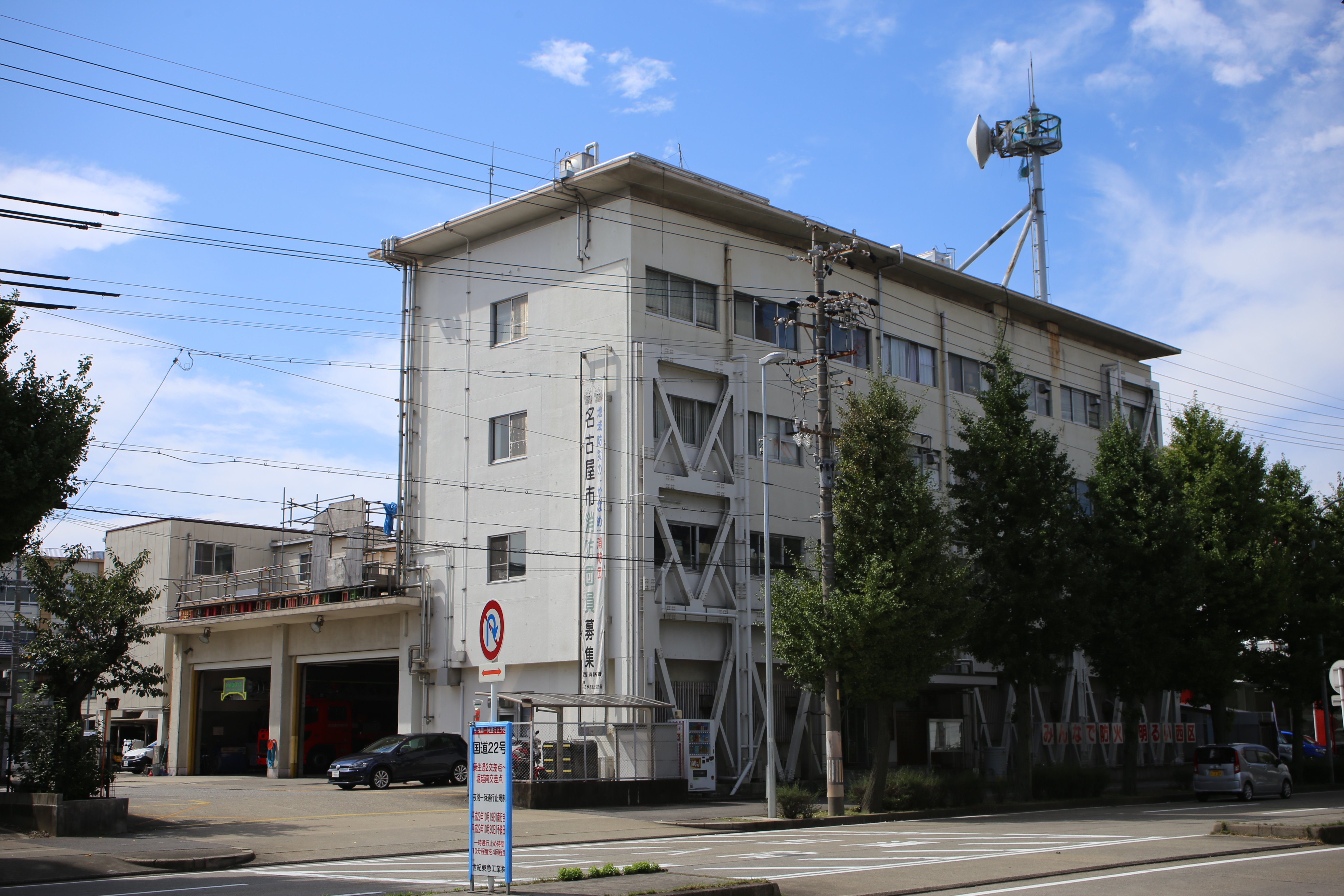 名古屋市西区児玉二丁目の名古屋市消防局西消防署